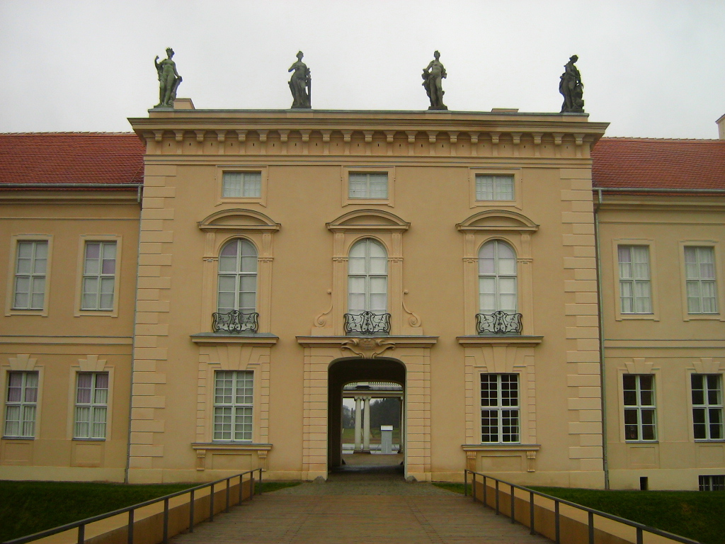 Portal des Schlosses Rheinsberg in Rheinsberg (Landkreis Ostprignitz-Ruppin, Brandenburg).